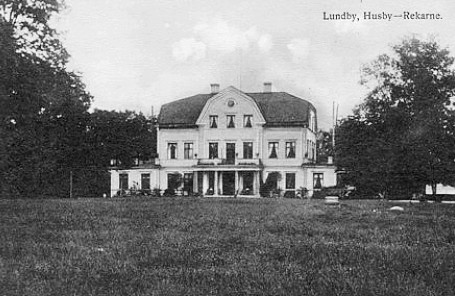 Lundby gård, huvudbyggnad